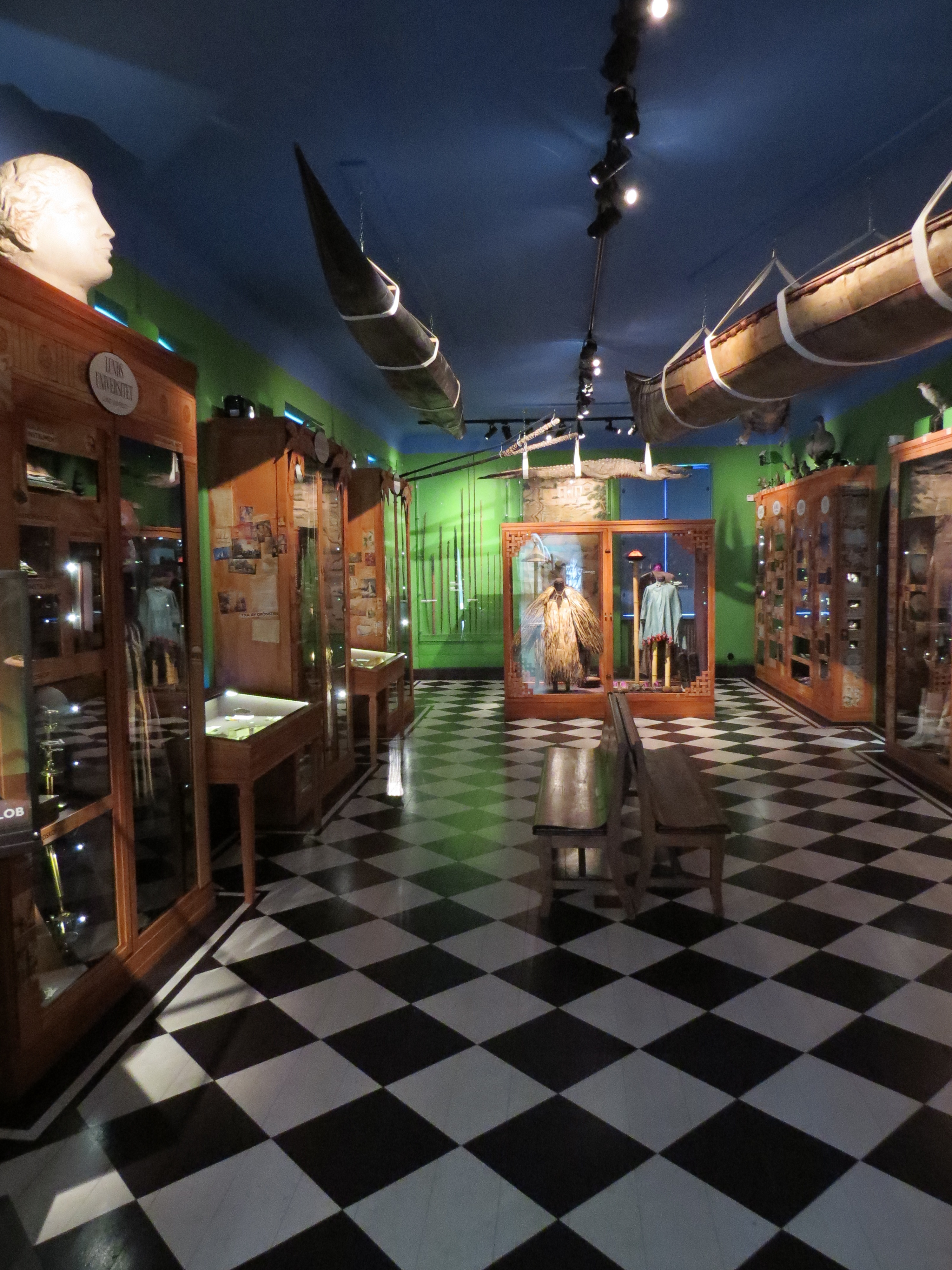 Kilian Stobæus' Kuriosakabinet i Historisk Museum, Lund